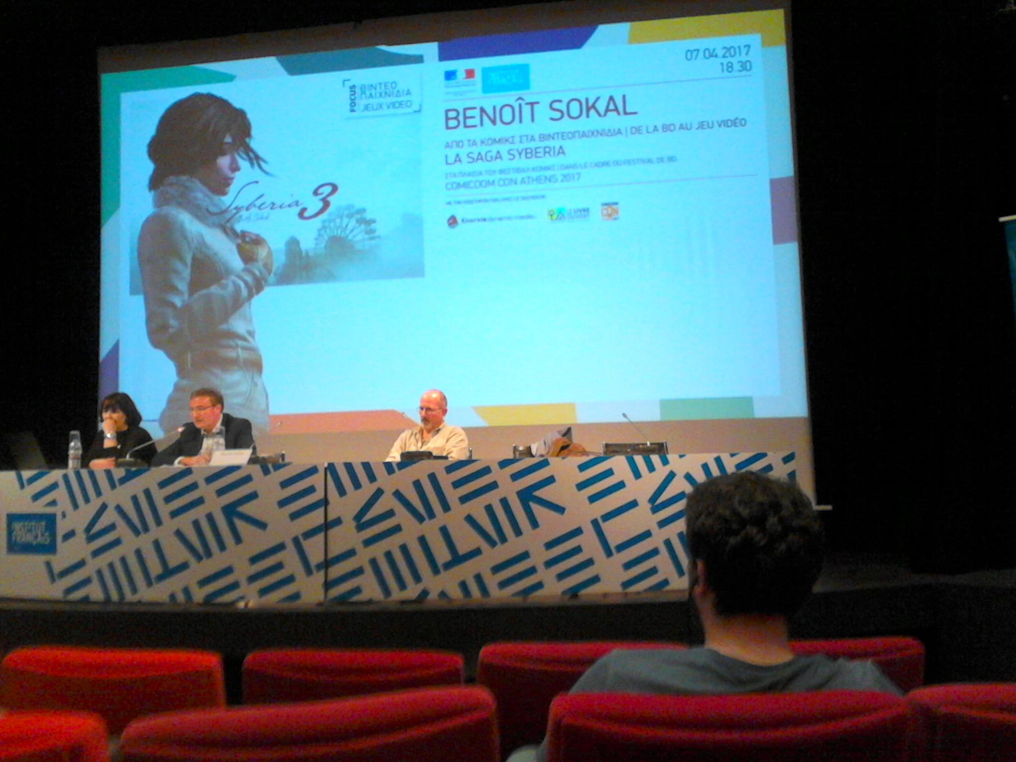 Επίσκεψη του Benoît Sokal στο Γαλλικό Ινστιτούτο στο πλαίσιο του Φεστιβάλ κόμικς 2017